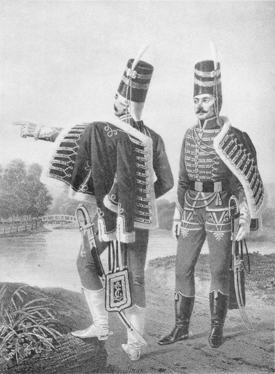 Штаб-офицер и Унтер-офицер Болгарского Гусарского полка, с 1776 по 1783 г.